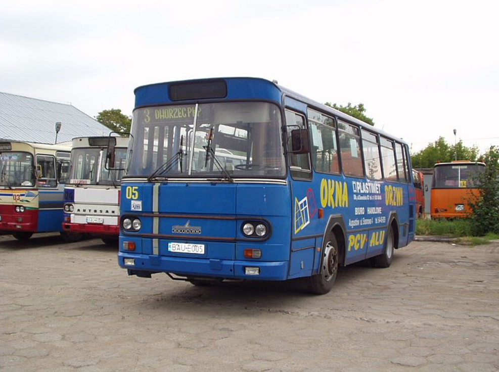 Autosan H9-35#02